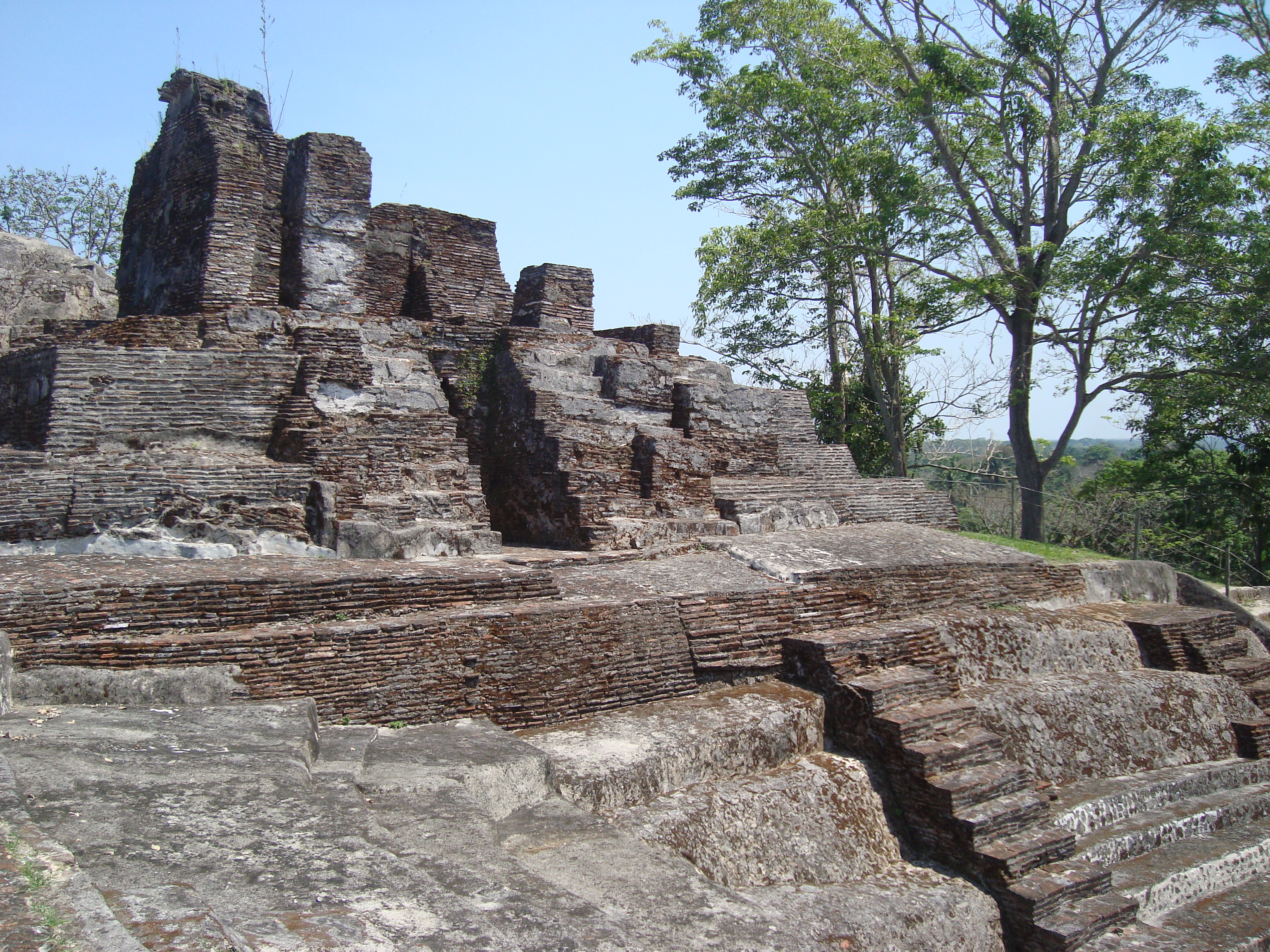 Cara frontal del Templo IV en la Gran Acrópolis de la cuidad maya de Comalcalco. Tabasco. México.